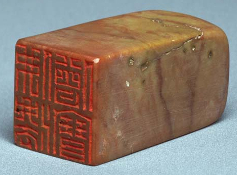 中井敬所作 石印 印面長2.3 白文「仏法僧宝」